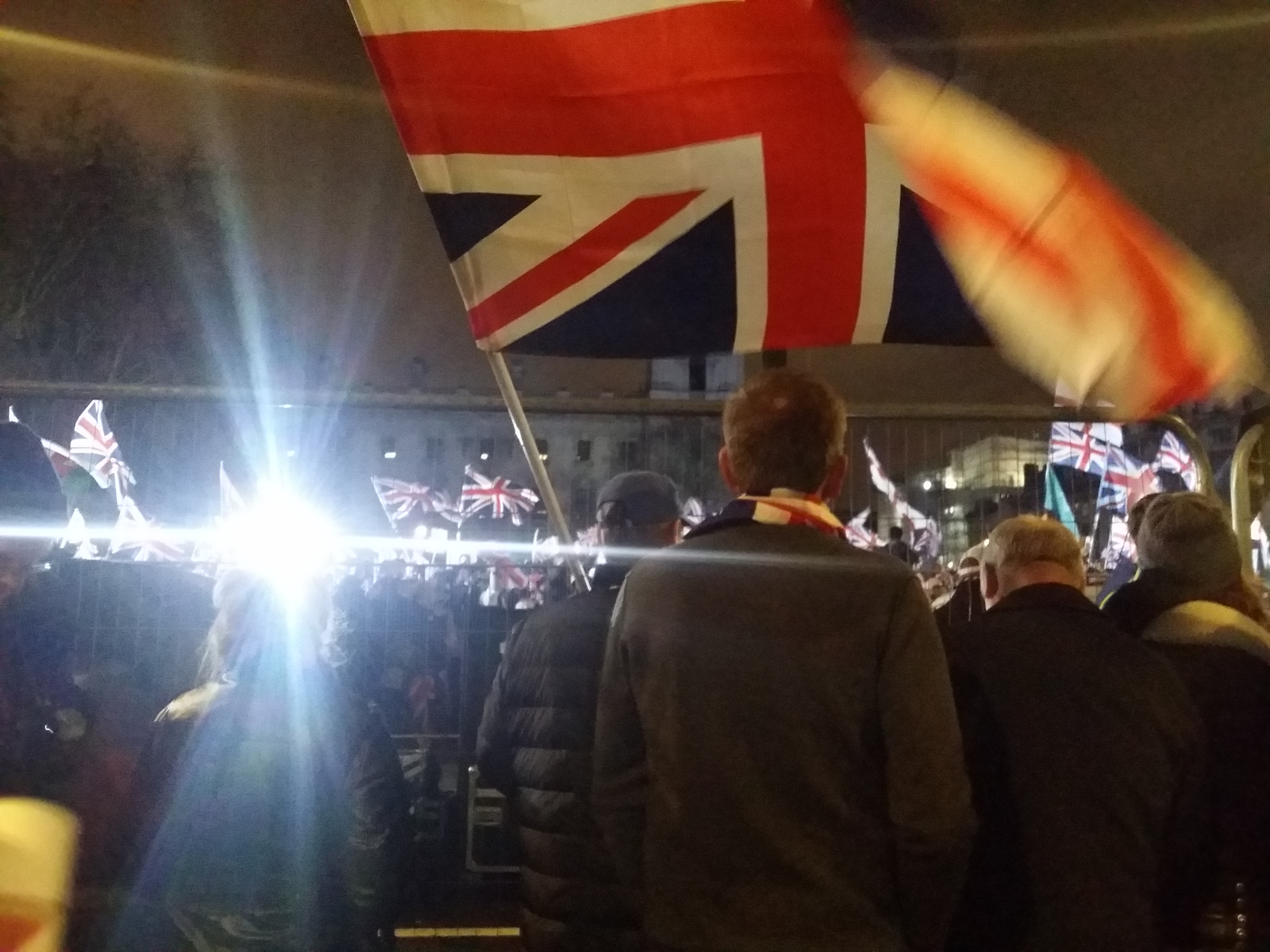 Westminster